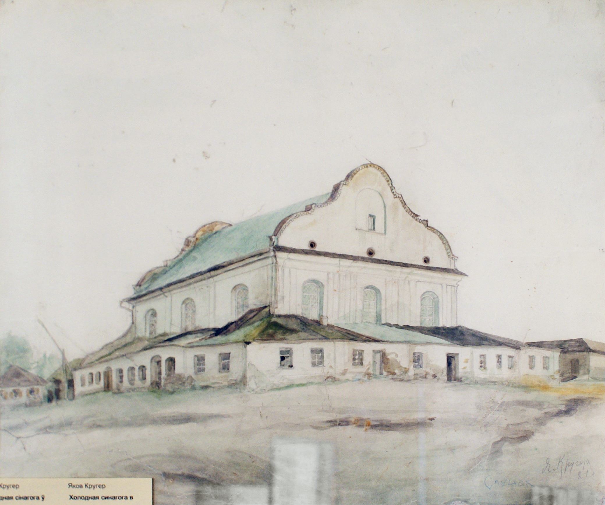 Якаў Кругер. Халодная сінагога ў Слуцку